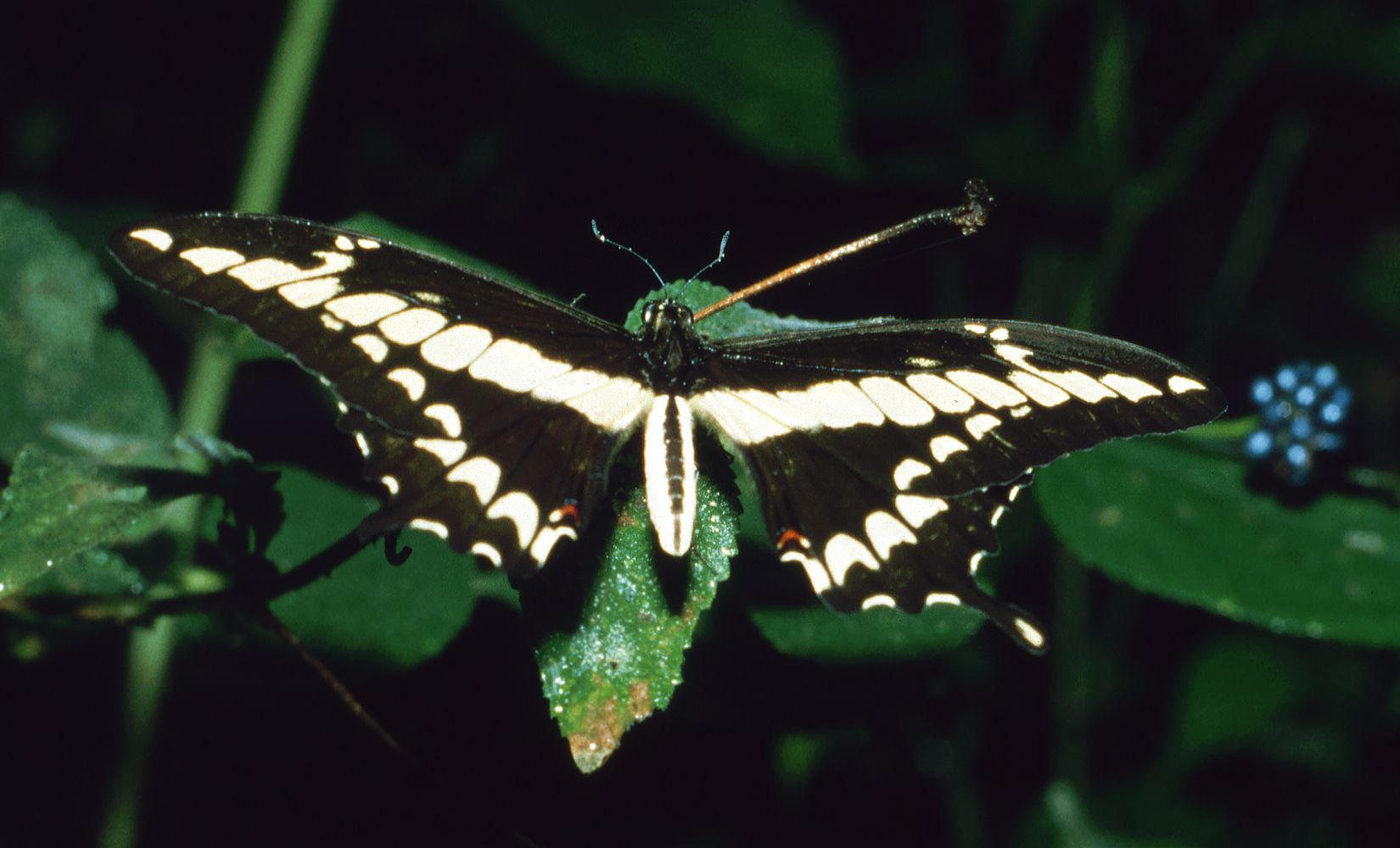 Papilio thoas — "Ritterfalter"/butterfly, (Papilionidae). Jardín de las Mariposas, Monteverde Cloud Forest Reserve, Cordillera de Tilarán, Puntarenas Province, Costa Rica.